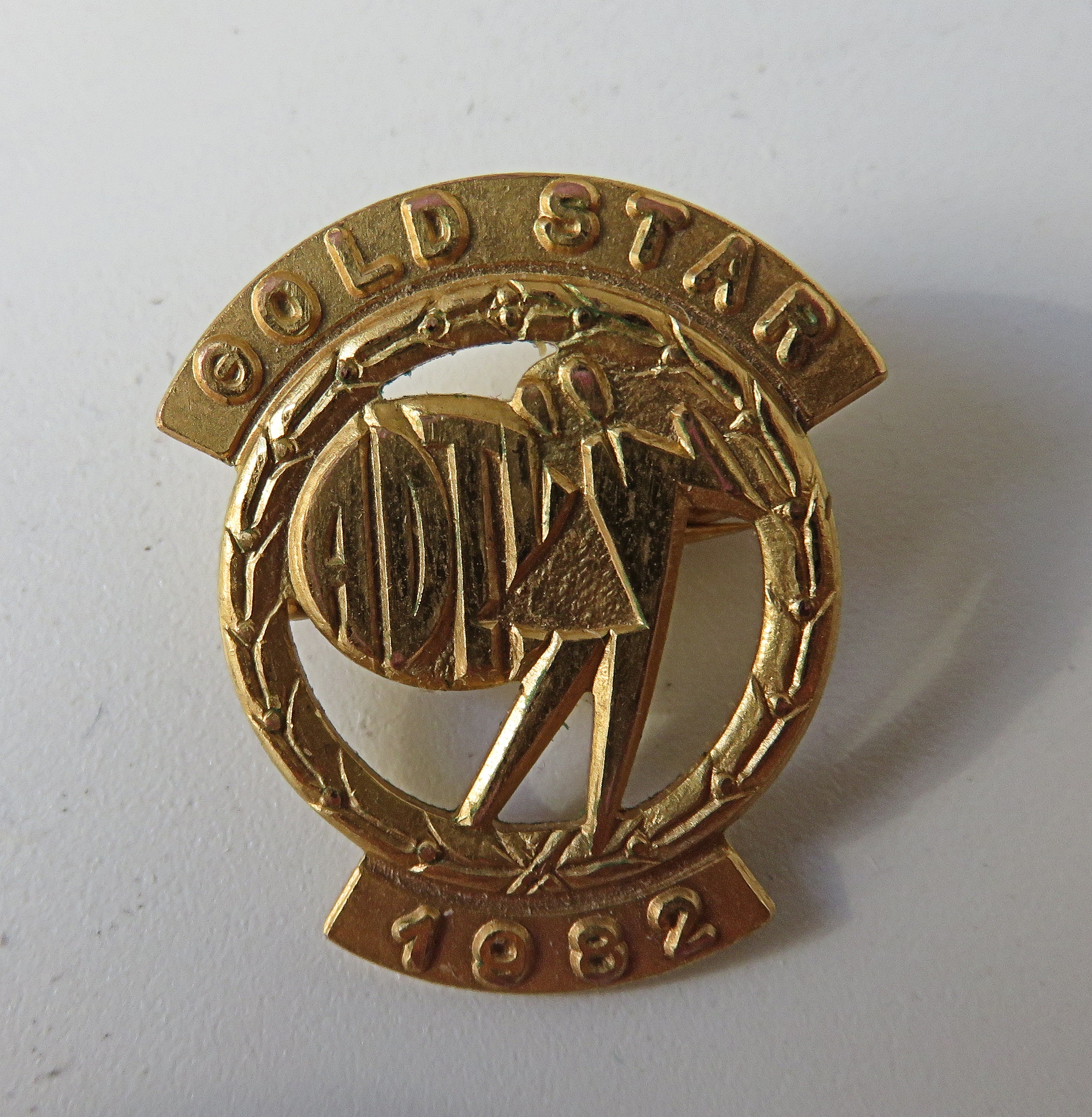 Deutsches Tanzabzeichen Gold Star 1982